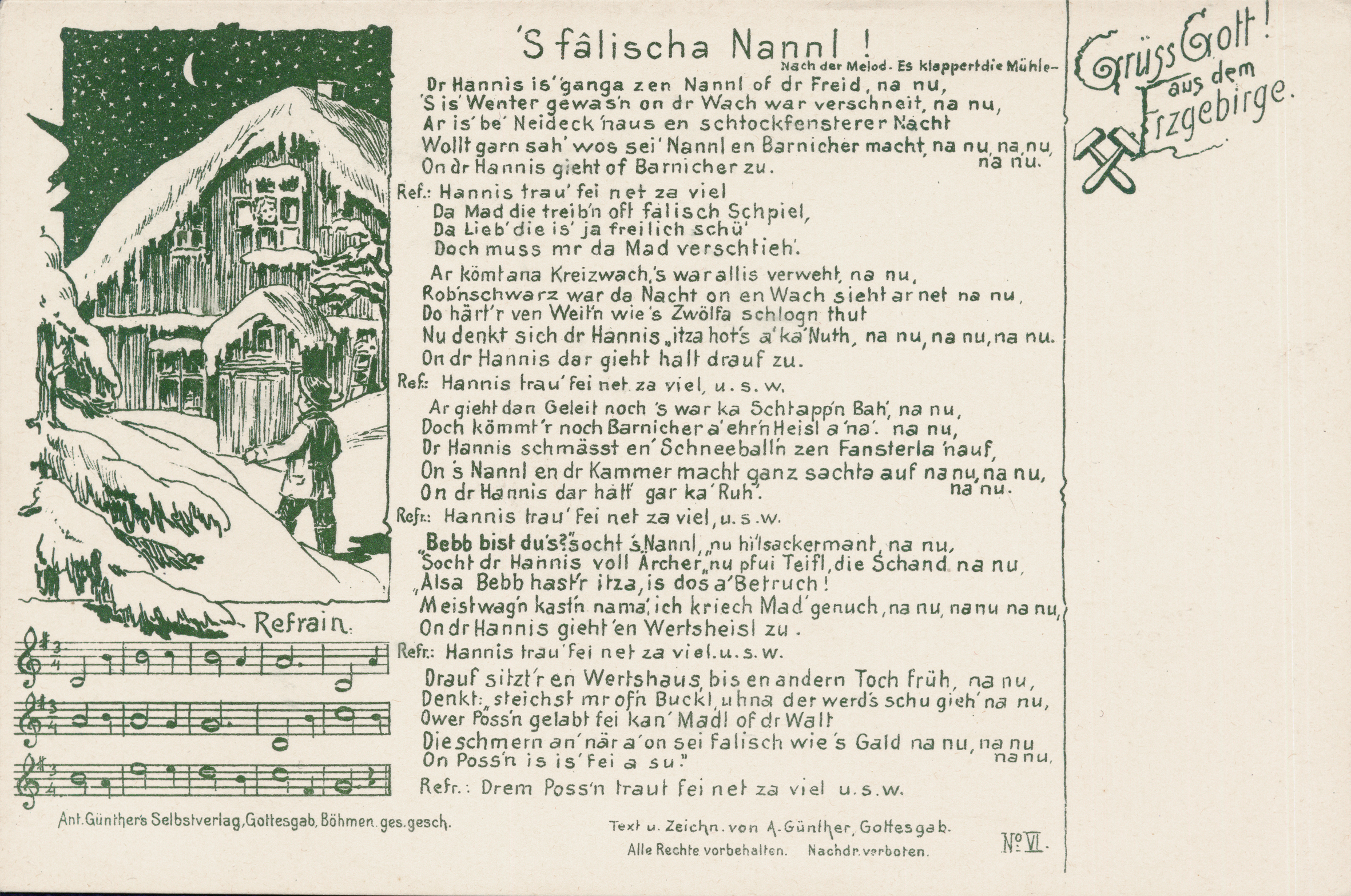 Anton Günther-Liedpostkarte VII - 's falischa Nannl! ca. 1902